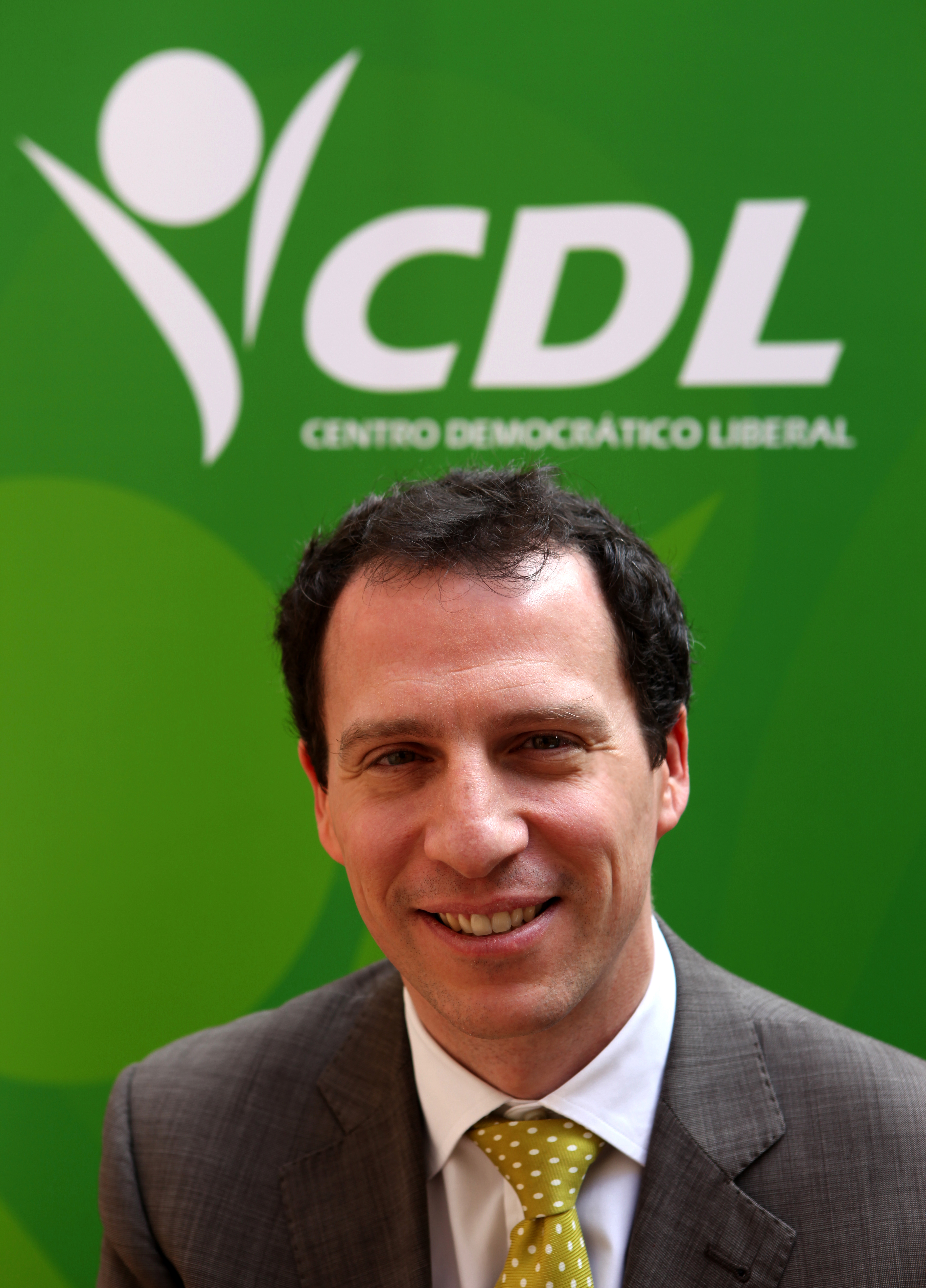 Sean O´Curneen Cañas, Presidente del Centro Democrático Liberal